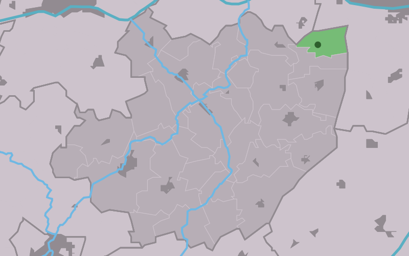 Kaartsje fan himrik fan Jellum